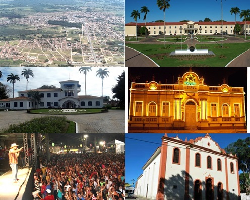 Panorama de Cruz das Almas